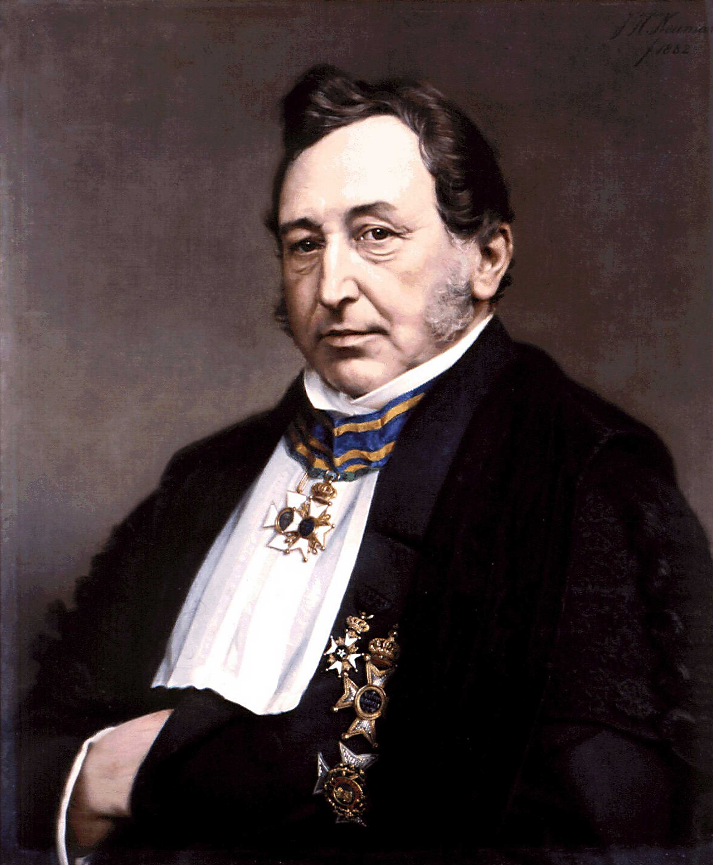 Gerardus Johannes Mulder also: Gerrit Jan Mulder (*1802-1880), Dutch chemist